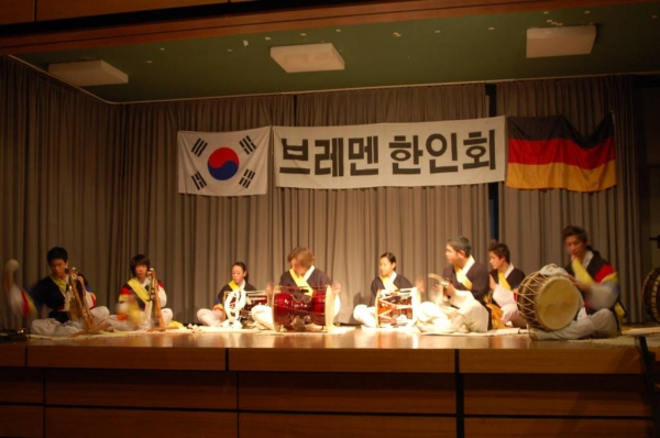 Foto aus Samulnori Vorspiel auf Versammlung des Haninhoe Bremen e.V.